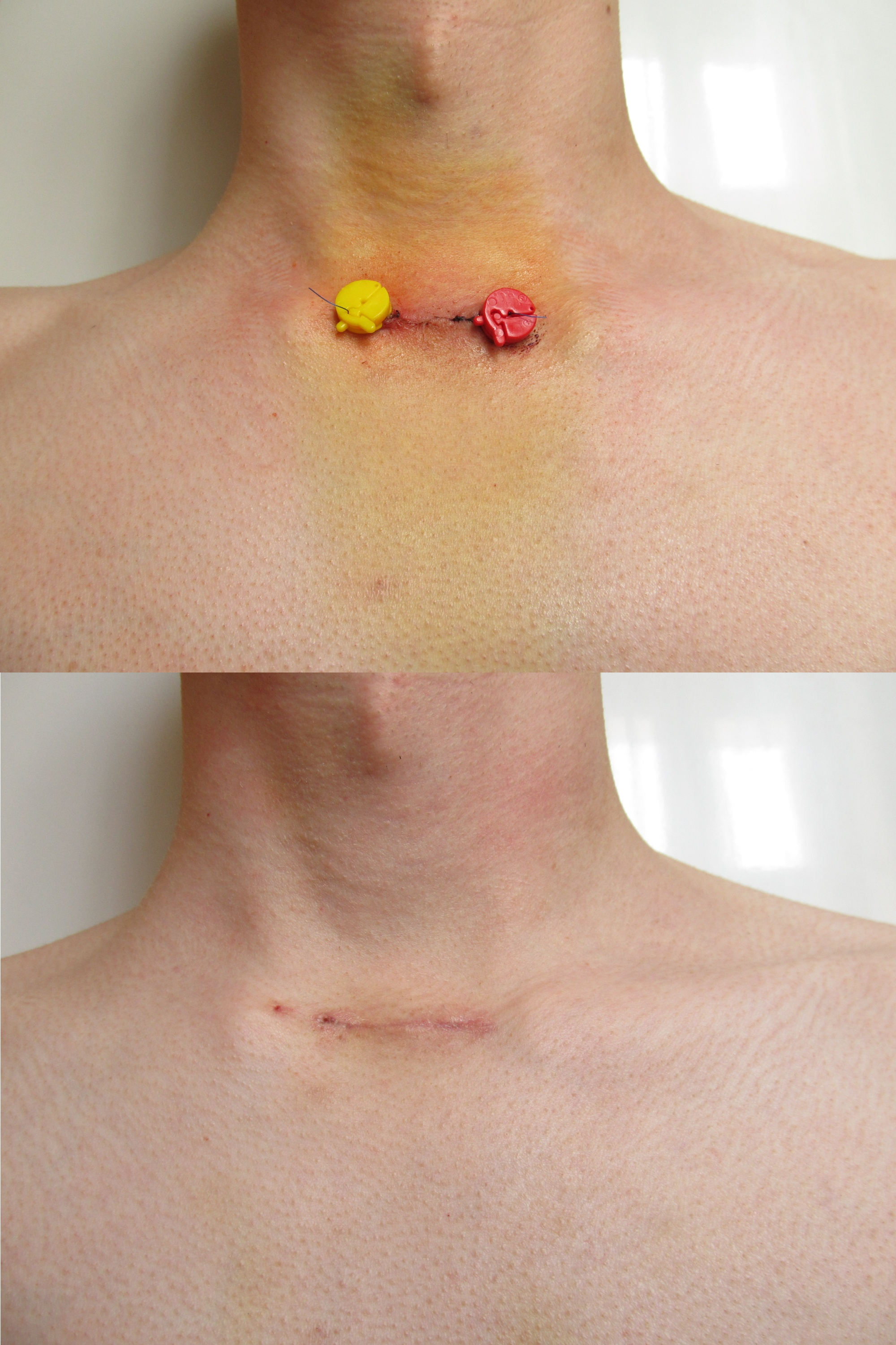 Mediastinoskopia - blizna pooperacyjna przed (2 dni) i po zdjęciu szwy (10 dni)